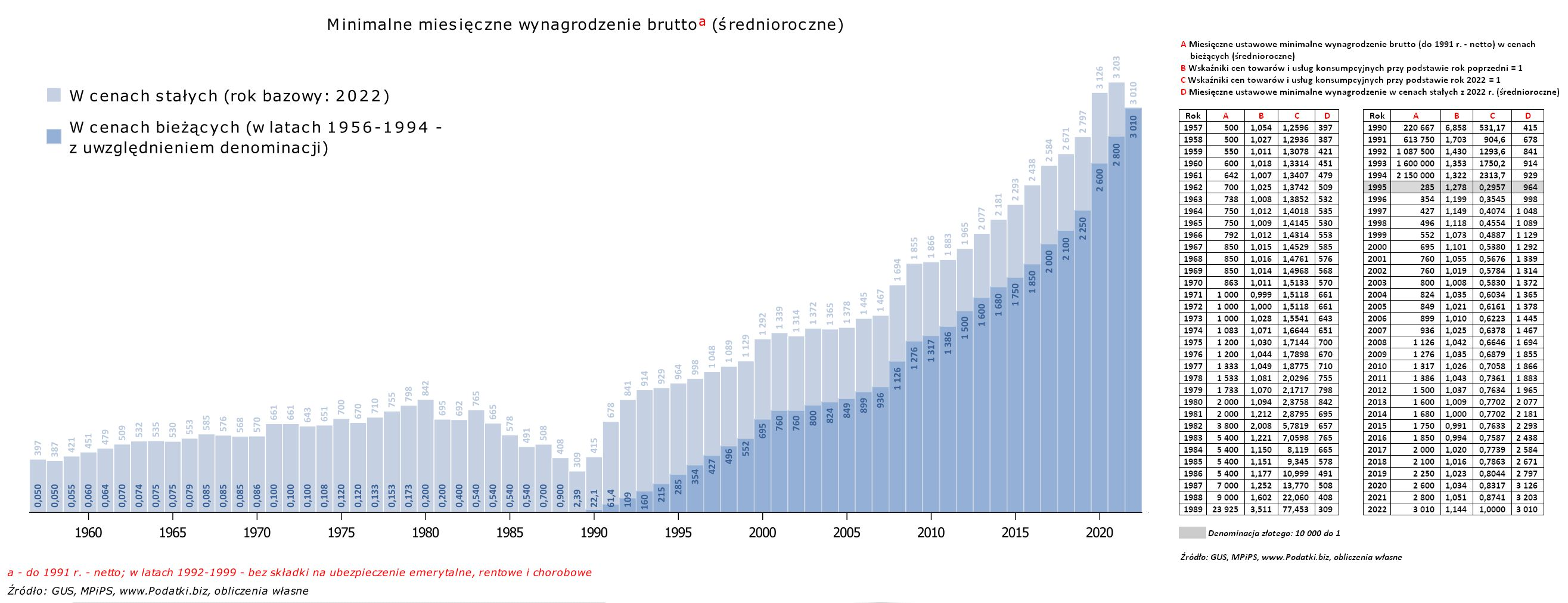 Minimalne miesięczne wynagrodzenia brutto (do grudnia 1991 r. - netto) realne (miesiąc bazowy: grudzień 2015 r.) i nominalne w PLN. Wykres na podstawie danych: 1.MPiPS - Minimalne wynagrodzenie za pracę 2.GUS - Miesięczne wskaźniki cen towarów i usług konsumpcyjnych od 1989 r.